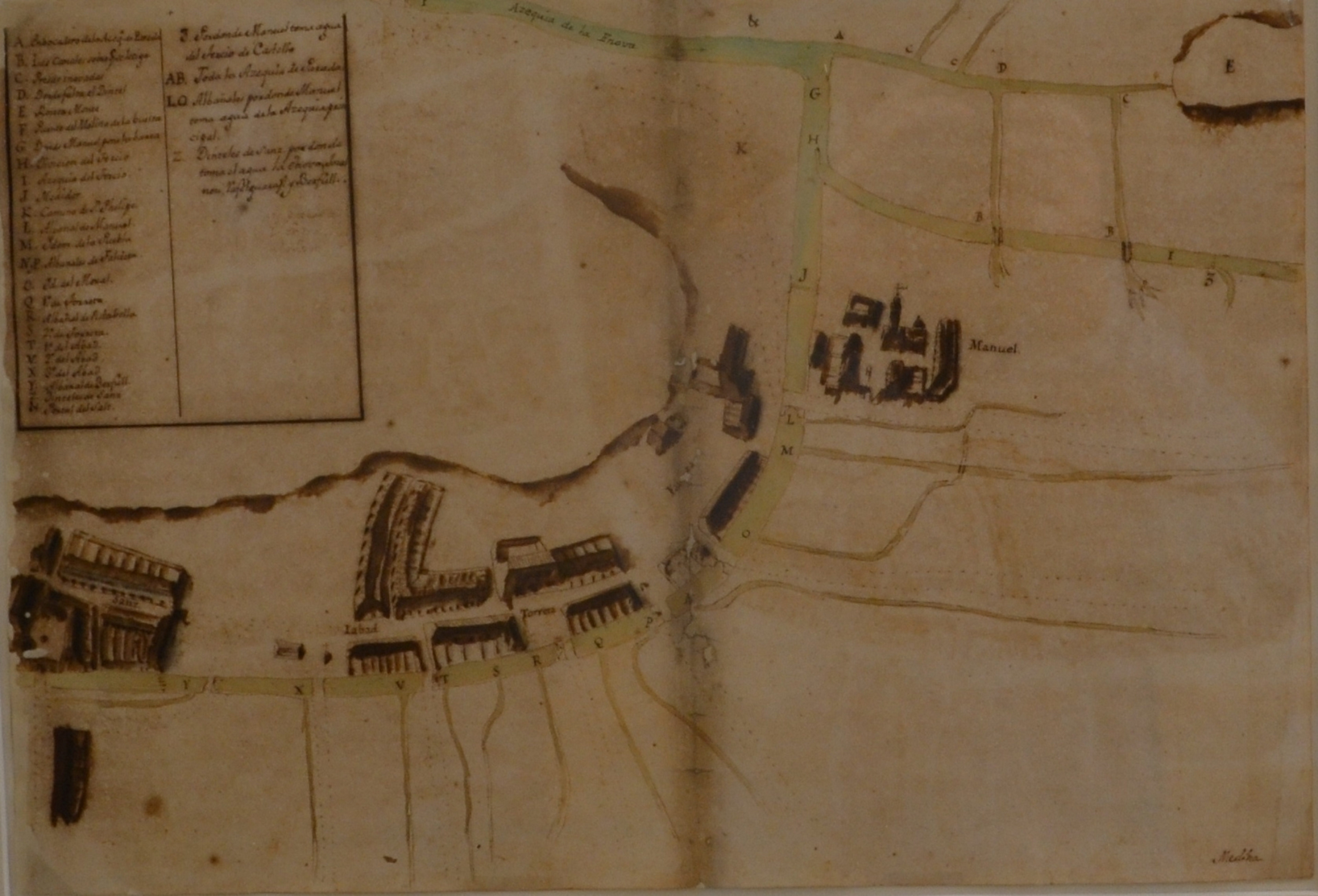 Plànol de la Séquia Comuna de l'Énova, dibuixat per Casimir Medina, agrimensor (1730). ARV: Mapes i plànol, núm. 345. Arxiu del Regne de València.